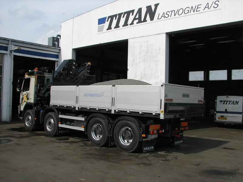 Volvo Truck MX at Titan Lastvogne A/S